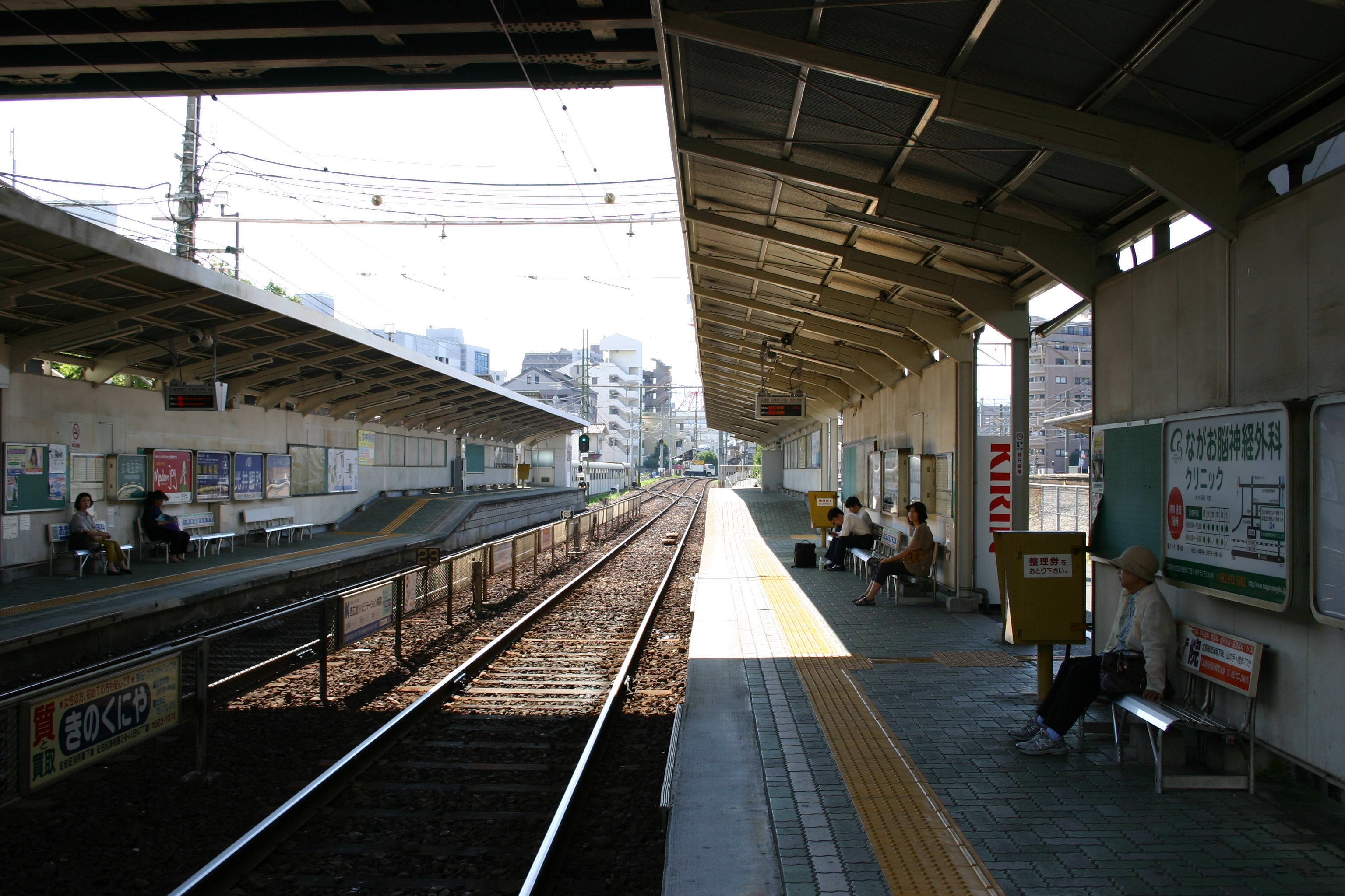 広島方面ホームから宮島方向を望む